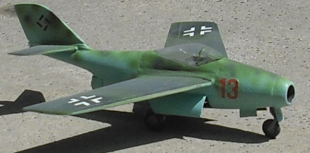 Finaler Entwurf der Ta 183